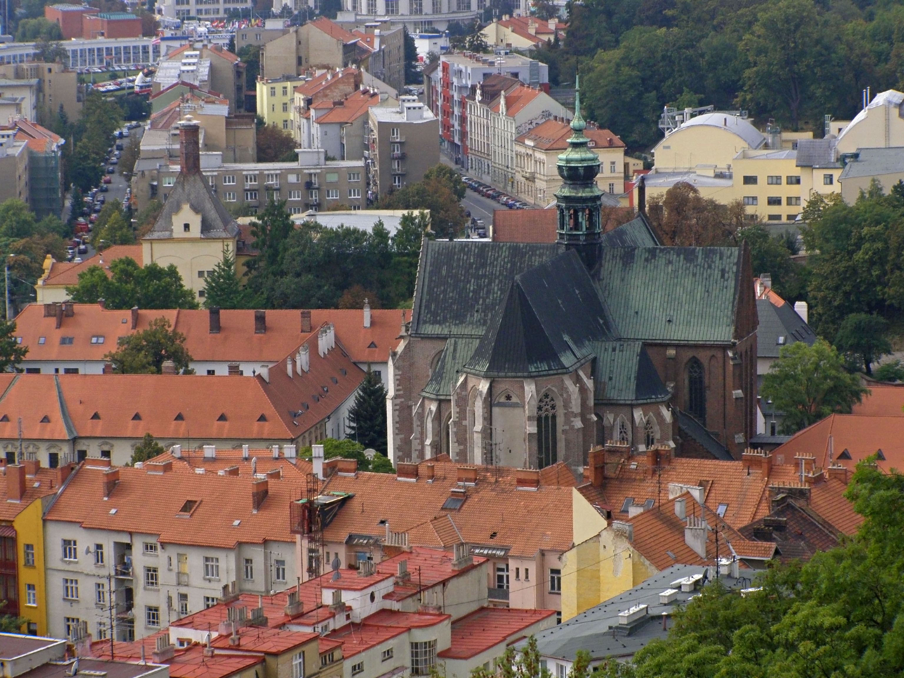 Brno, Bazilika Nanebevzetí Panny Marie